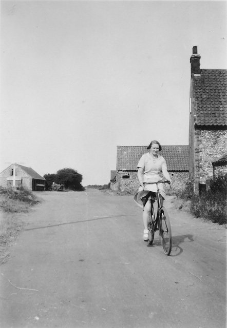 Shammer